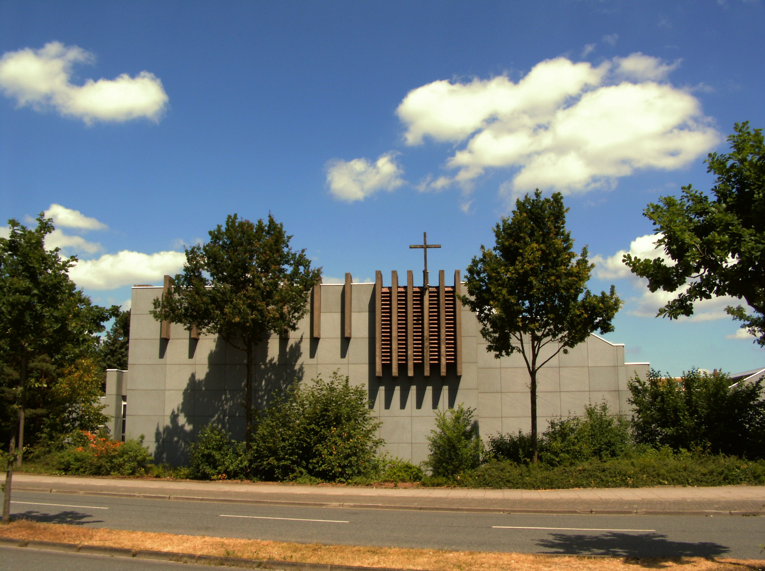 Ökumenisches Gemeindezentrum St. Stephanus in Lüneburg-Kaltenmoor, Ansicht der katholischen Kirche